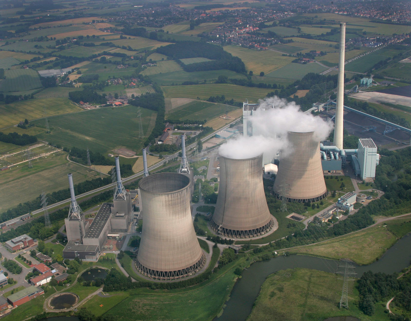 Luftbildaufnahme Hamm, Gersteinwerk